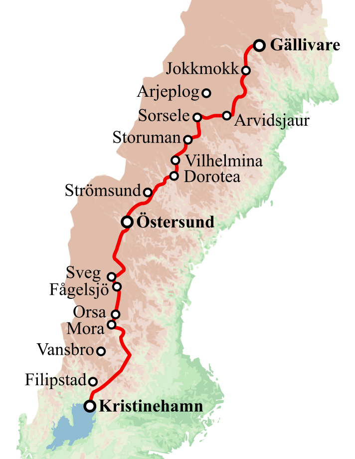 Inlandsbanan Kristinehamn-Gällivare